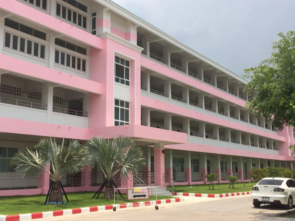 อาคาร 4 โรงเรียนสวนกุหลาบวิทยาลัย รังสิต